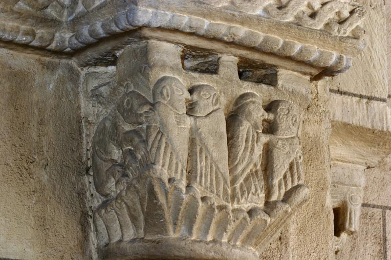 Chapiteau du choeur de l'église de Vauban